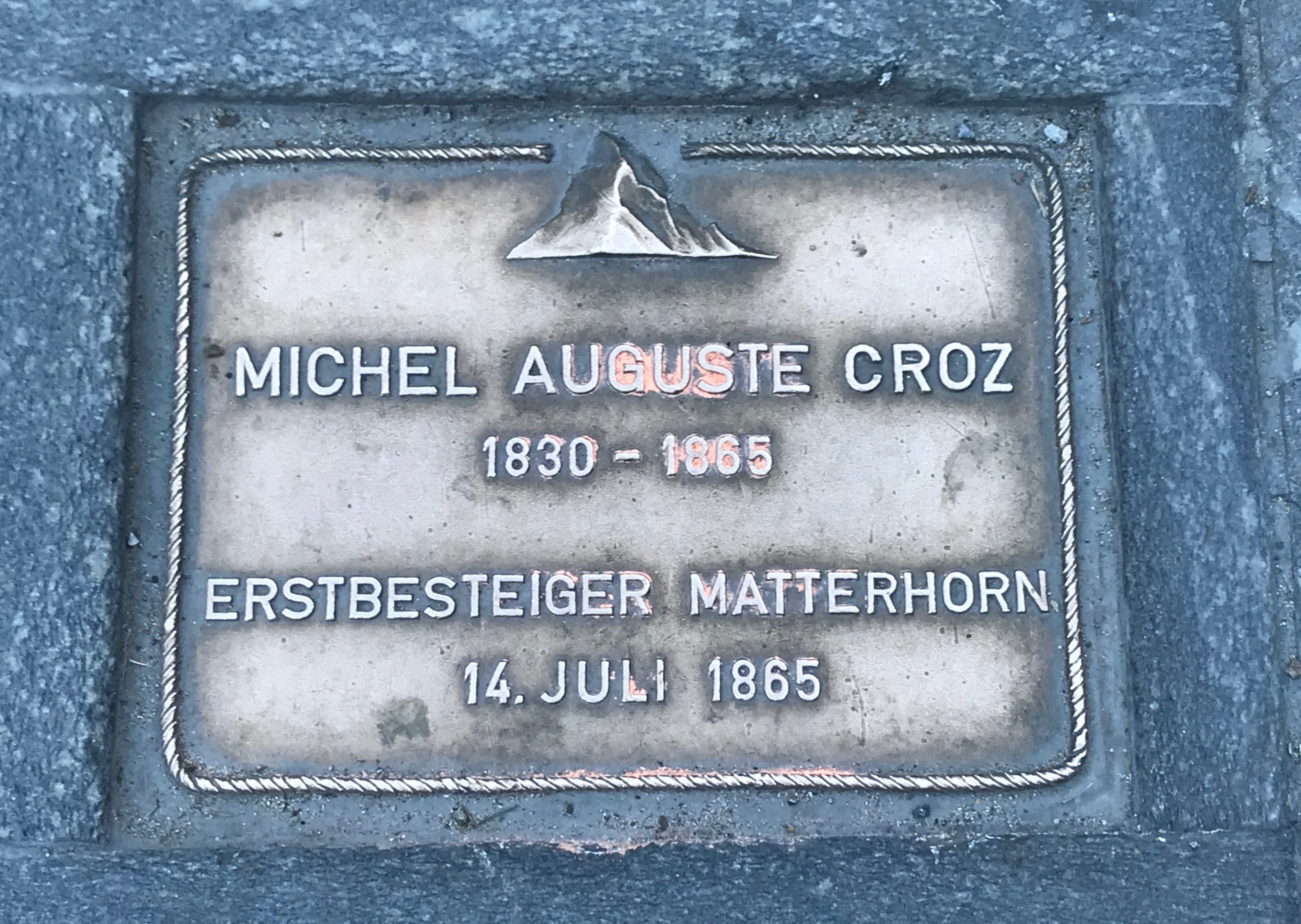 Gedenktafel in Zermatt